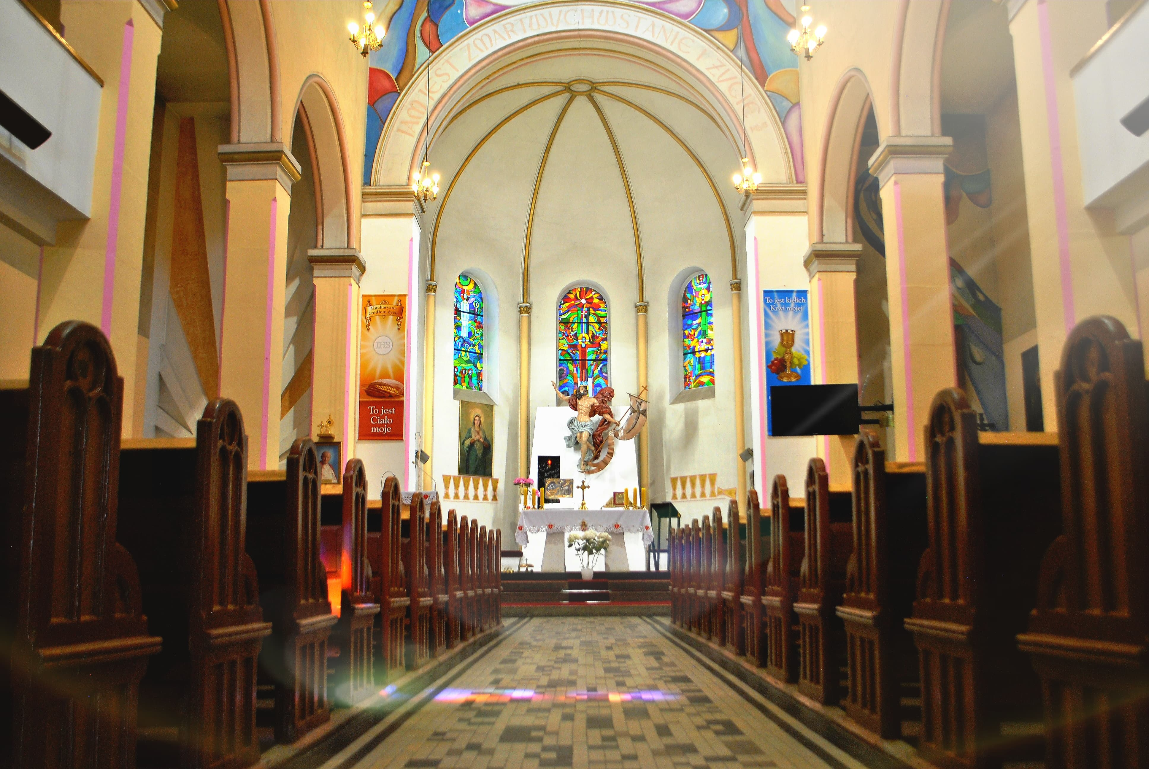 kościół parafialny Zmartwychwstania Pańskiego w Wałbrzychu